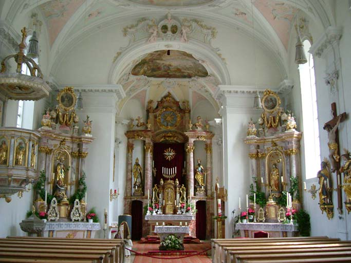 Wildsteig Church